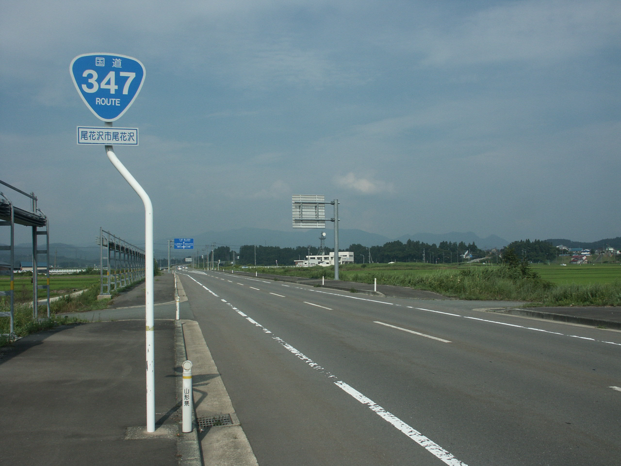 国道347号線山形県尾花沢市尾花沢付近